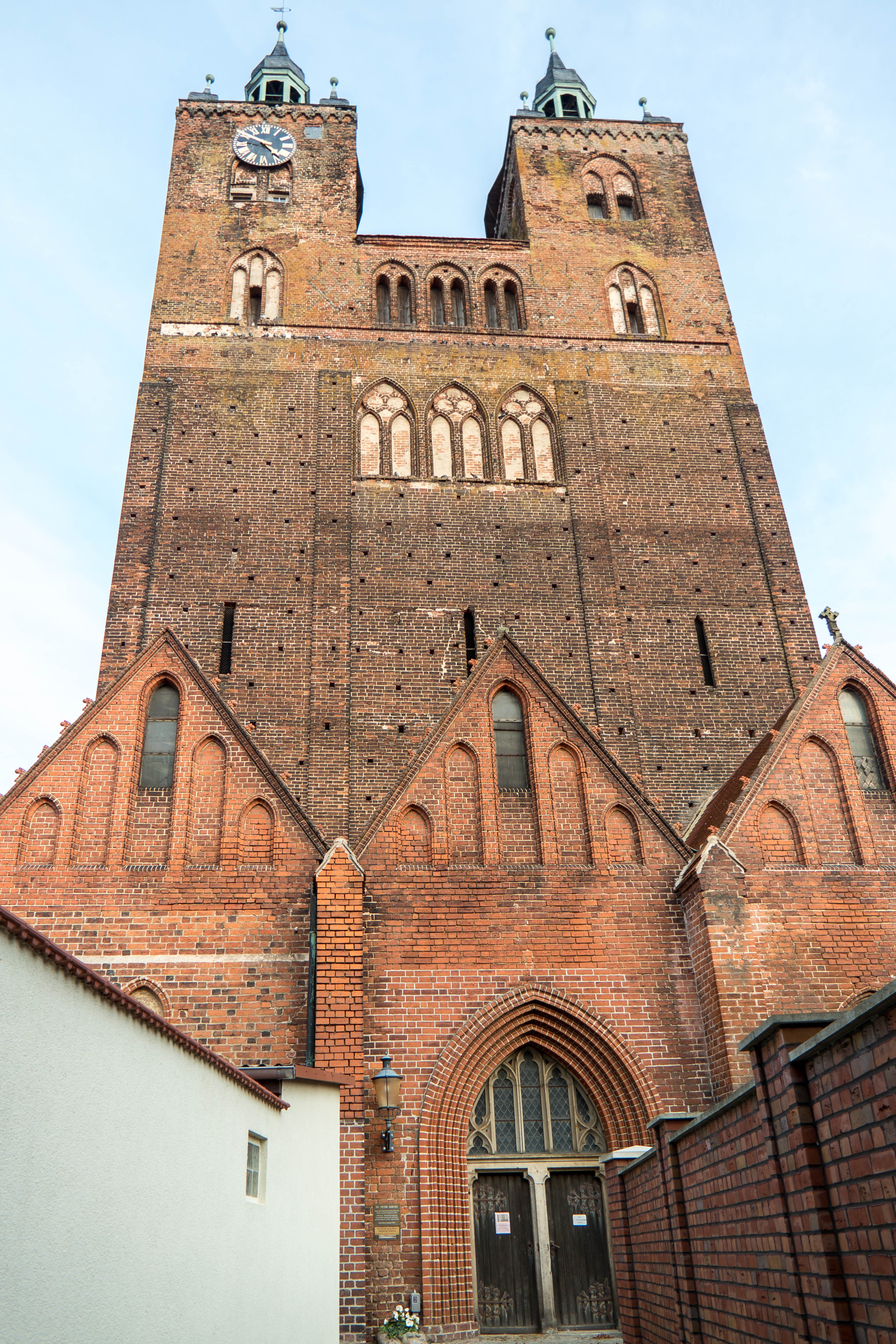 Kirche St. Peter und Paul Seehausen